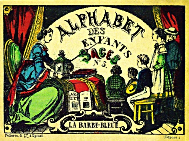 Images d'Épinal : Alphabet des enfants sages